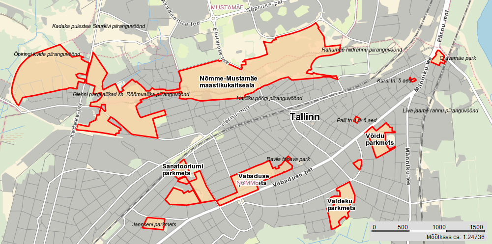 Nõmme linnaosa kaitsealad Maa-ameti kaardil.